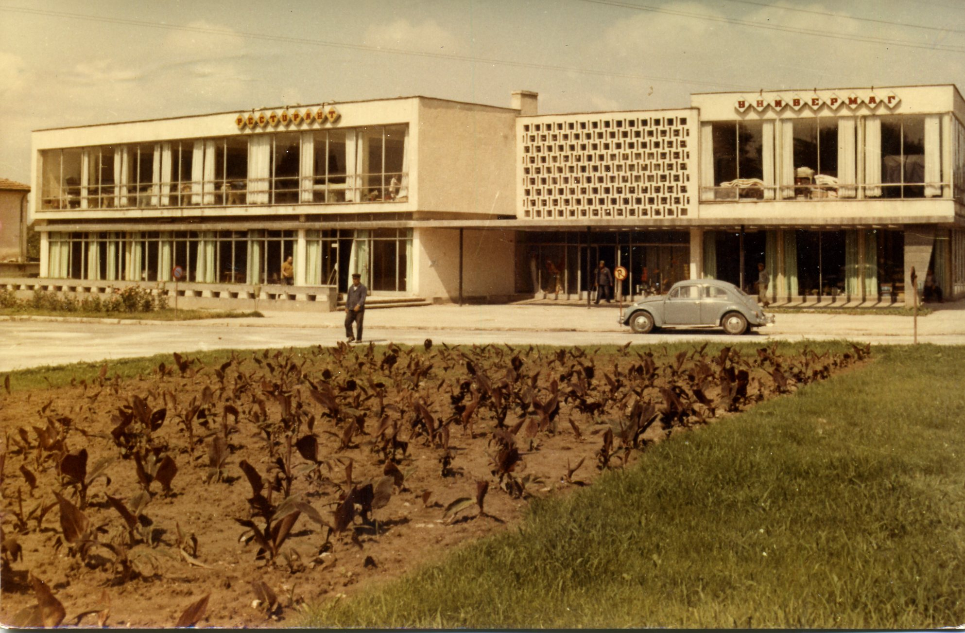 Дългопол универсален магазин ресторант Dalgopol Restaurant and Universal store Co-op postcard c 1969